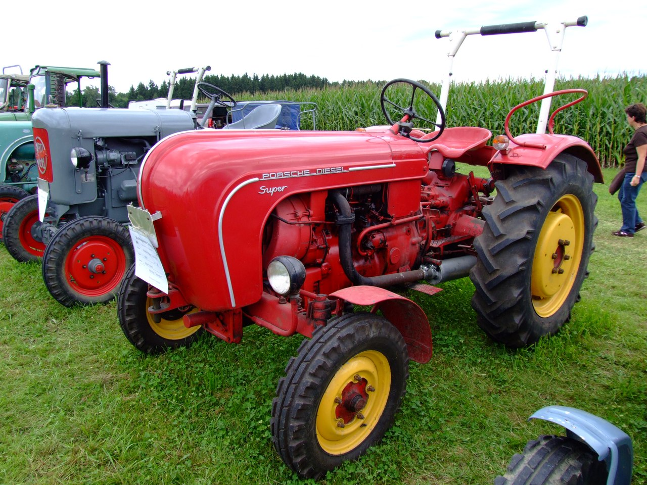 Porsche-Diesel Super 308 mit 38 PS, Baujahr 1960